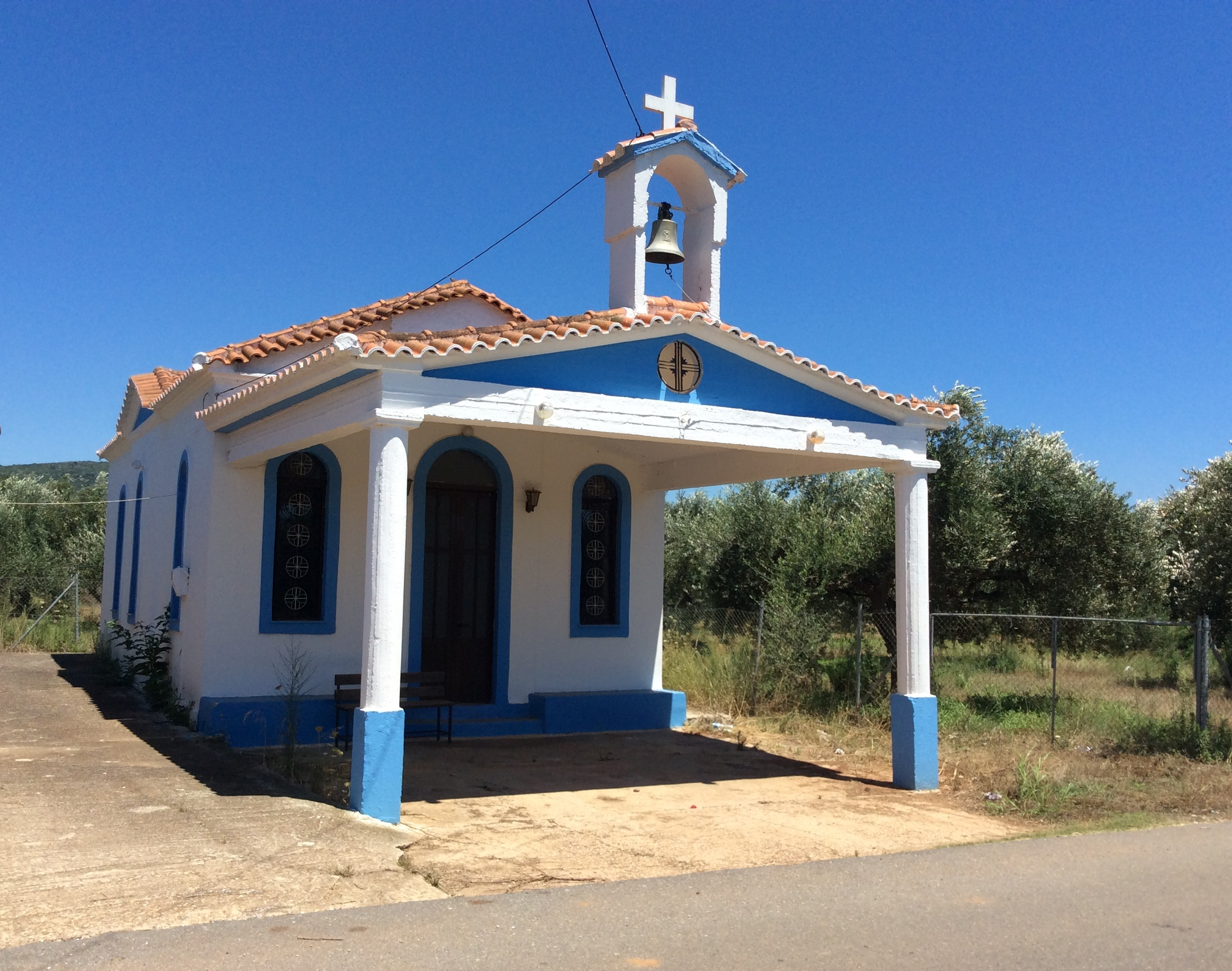 Πηγάδια Τριφυλίας Μεσσηνίας - Το εκκλησάκι της "Παναγίας" (Ιερός Ναός Κοιμήσεως της Θεοτόκου).